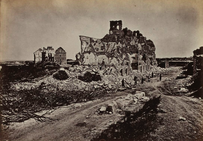 Casernes du fort d'Issy détruit par les bombardements versaillais, en 1871. Photographie isue de Les ruines de Paris et de ses environs, 1870-1871 d'Alfred d'Aunay et Alphonse Liébert.